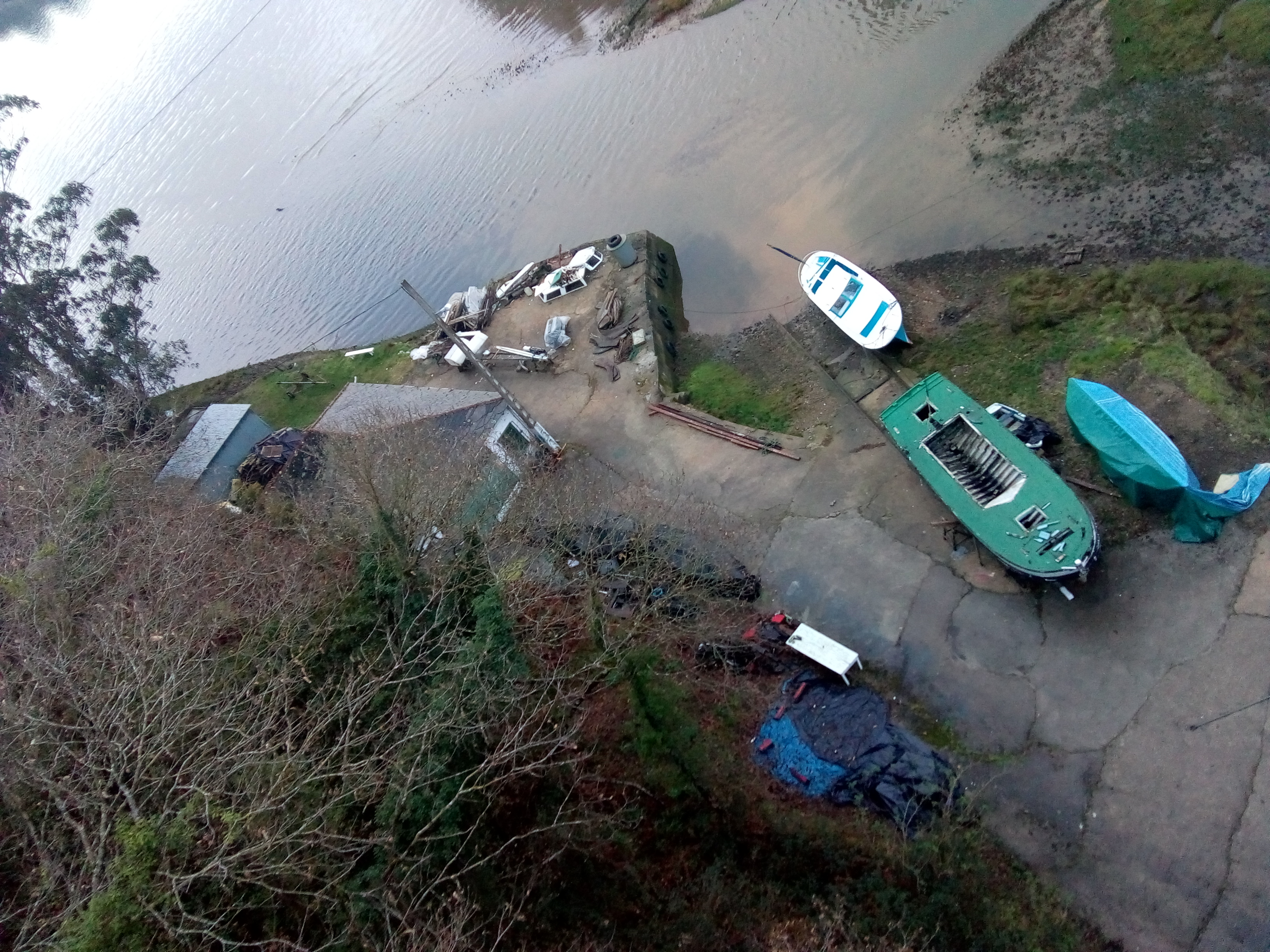 Astaleiro de buques de madeira. Taller de carpintaría de ribeira na Lieira, Castropol, sobre a ría de Ribadeo.